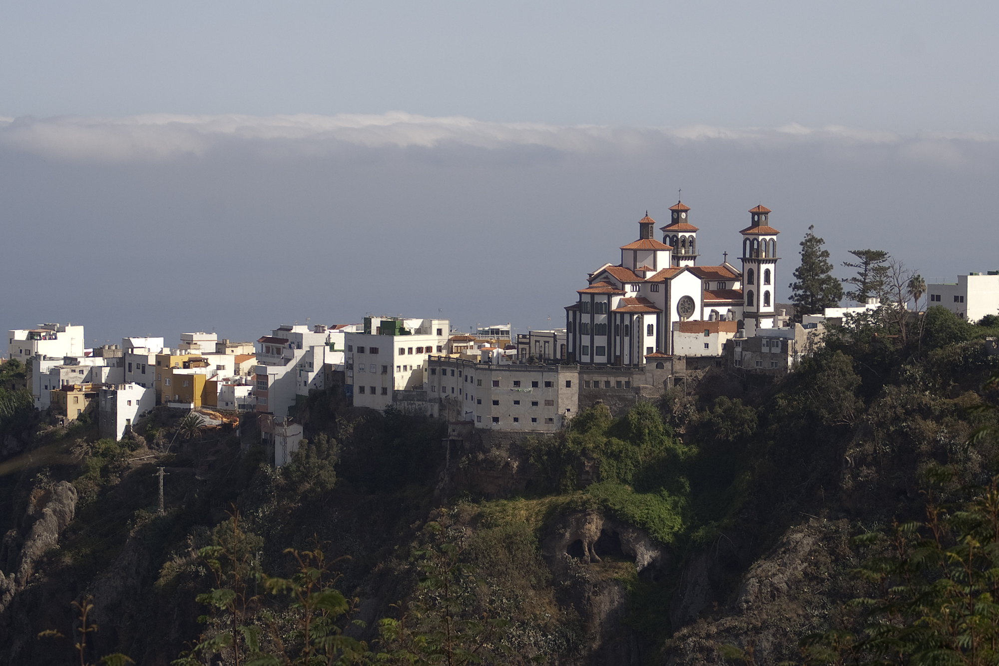 Moya